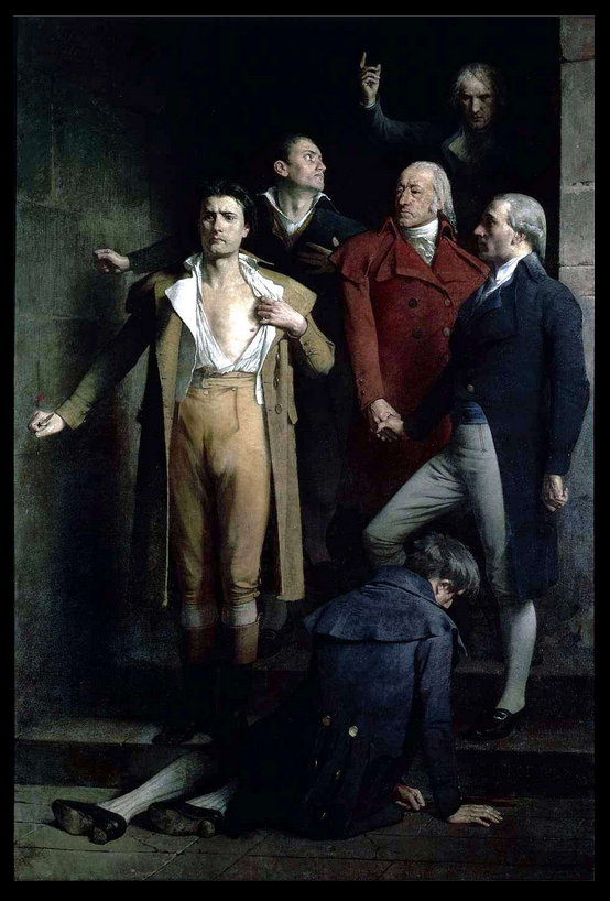 Charles Ronot (1820-1895).- Les derniers montagnards, ou les Les martyrs de prairial, 17 juin 1795. Dans ce tableau peint en 1882, les députés condamnés : Charles-Gilbert Romme, Jean-Marie-Claude-Alexandre Goujon, Ernest Dominique François Joseph Duquesnoy, Pierre Bourbotte, Jean-Michel Duroy et Pierre-Amable de Soubrany sont représentés. Analyse de l'œuvre par L'Histoire par l'Image